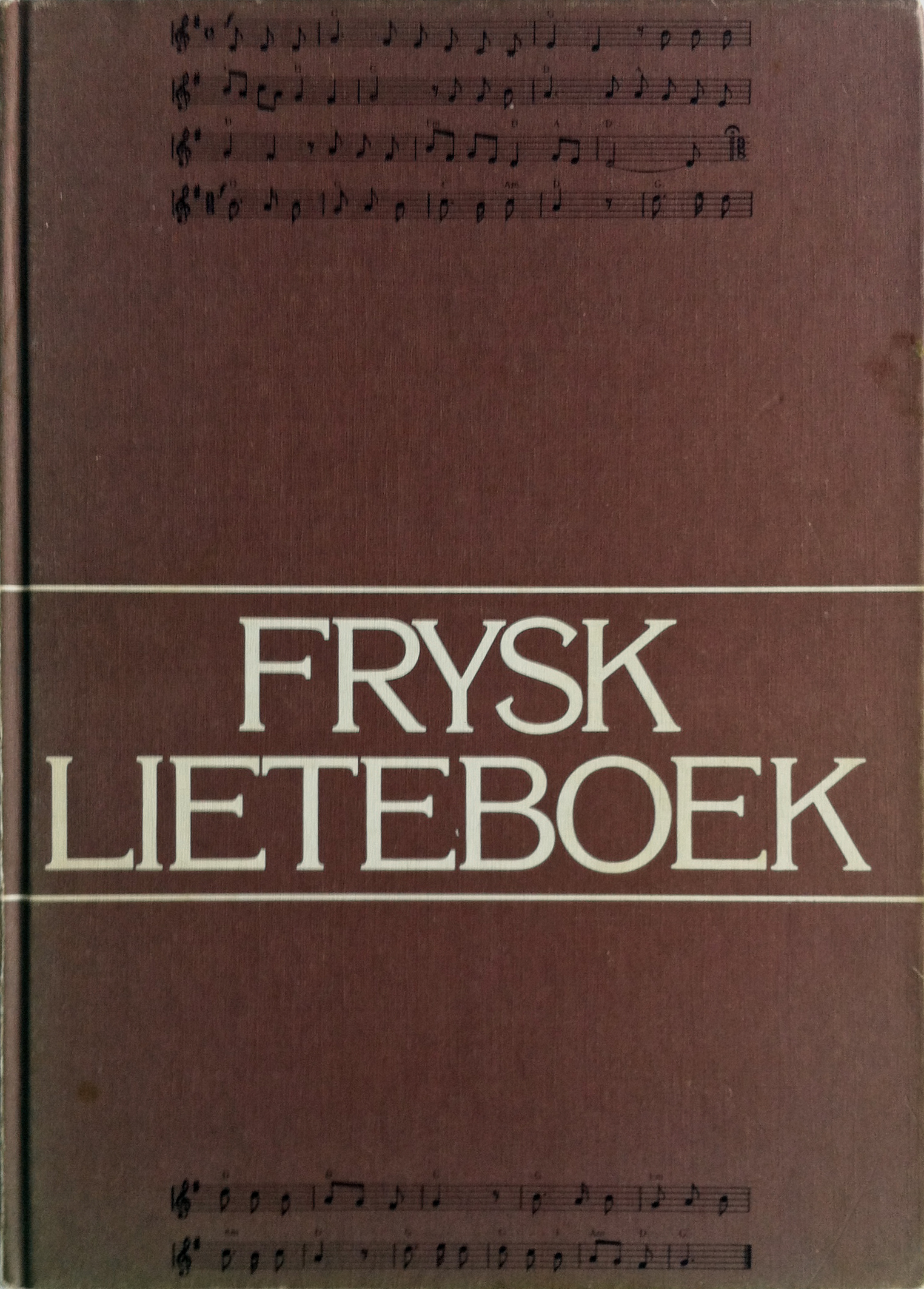 Omslach fan it Frysk Lieteboek út 1979